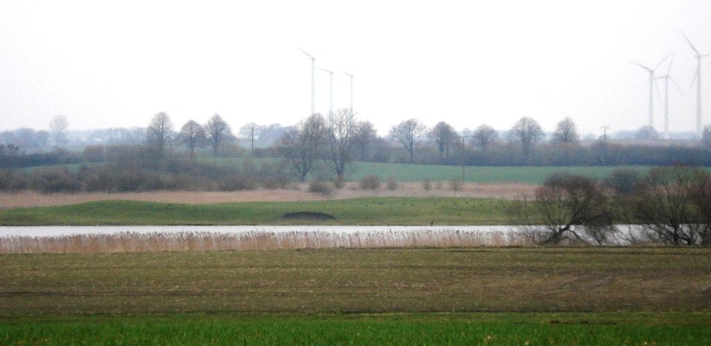 Der Scharstorfer Ringwall bei Schellhorn